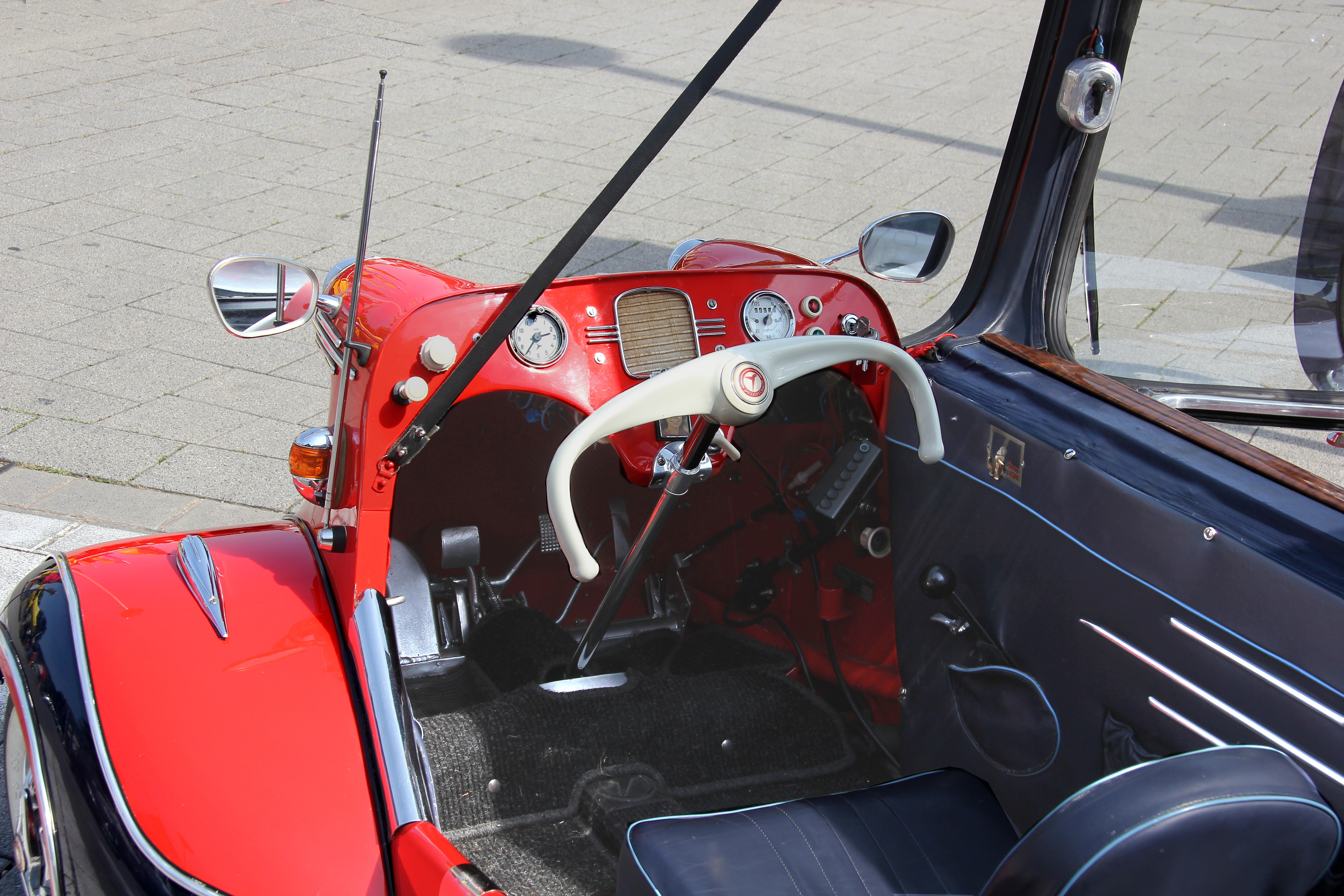 Cockpit des Messerschmitt KR 200, Baujahr 1955